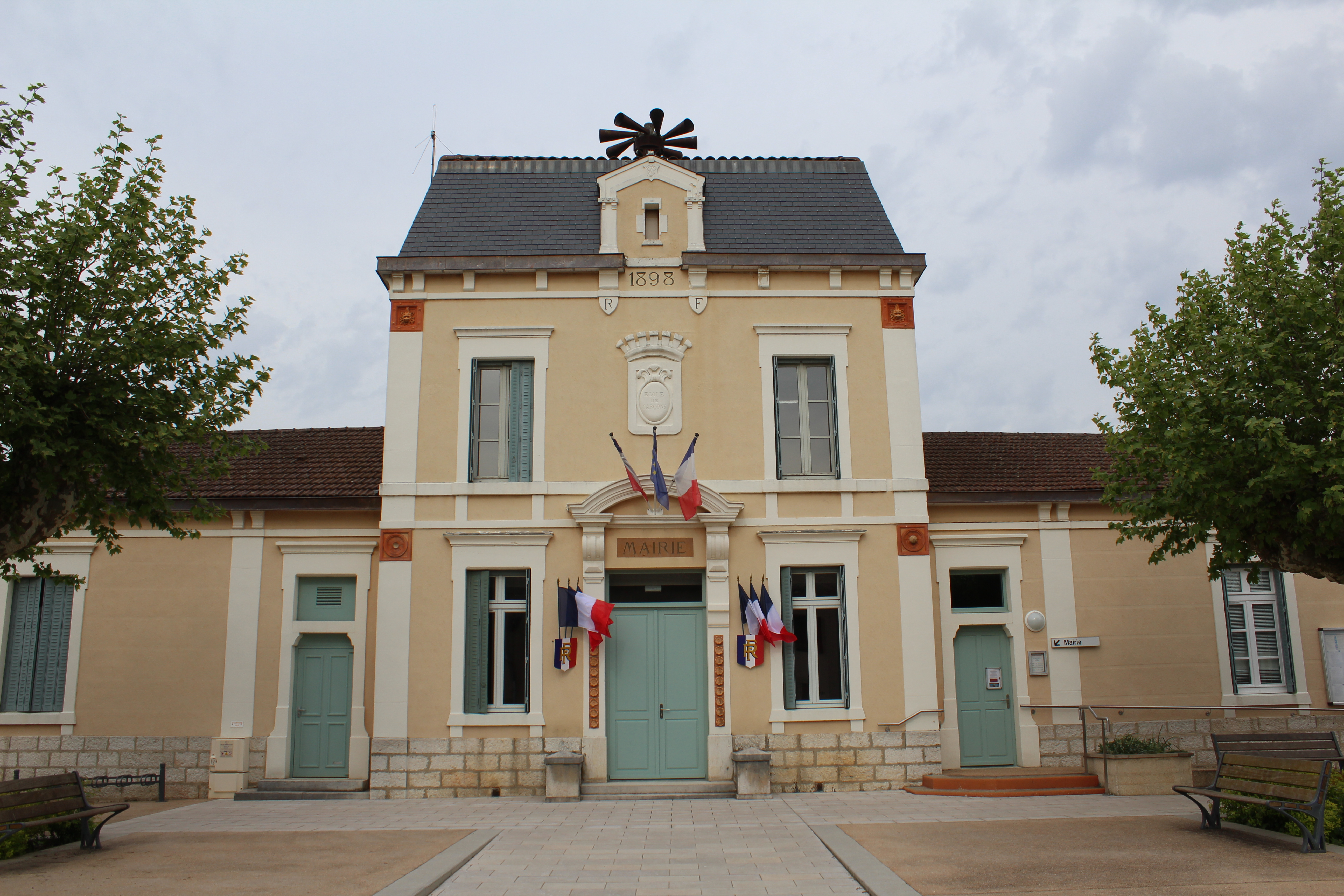 Mairie de Cras-sur-Reyssouze.